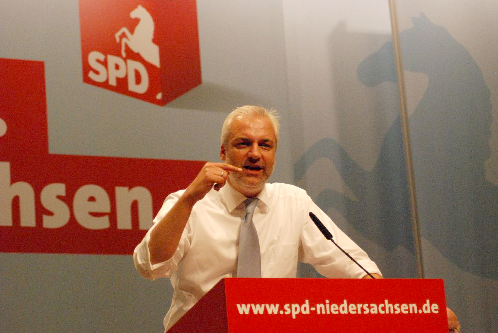 Garrelt Duin, Landesvorsitzender der Niedersächsischen SPD, bei der Landesvertreterversammlung am 16. Mai 2009 zur Aufstellung der SPD-Landesliste Niedersachsen zur Bundestagswahl.